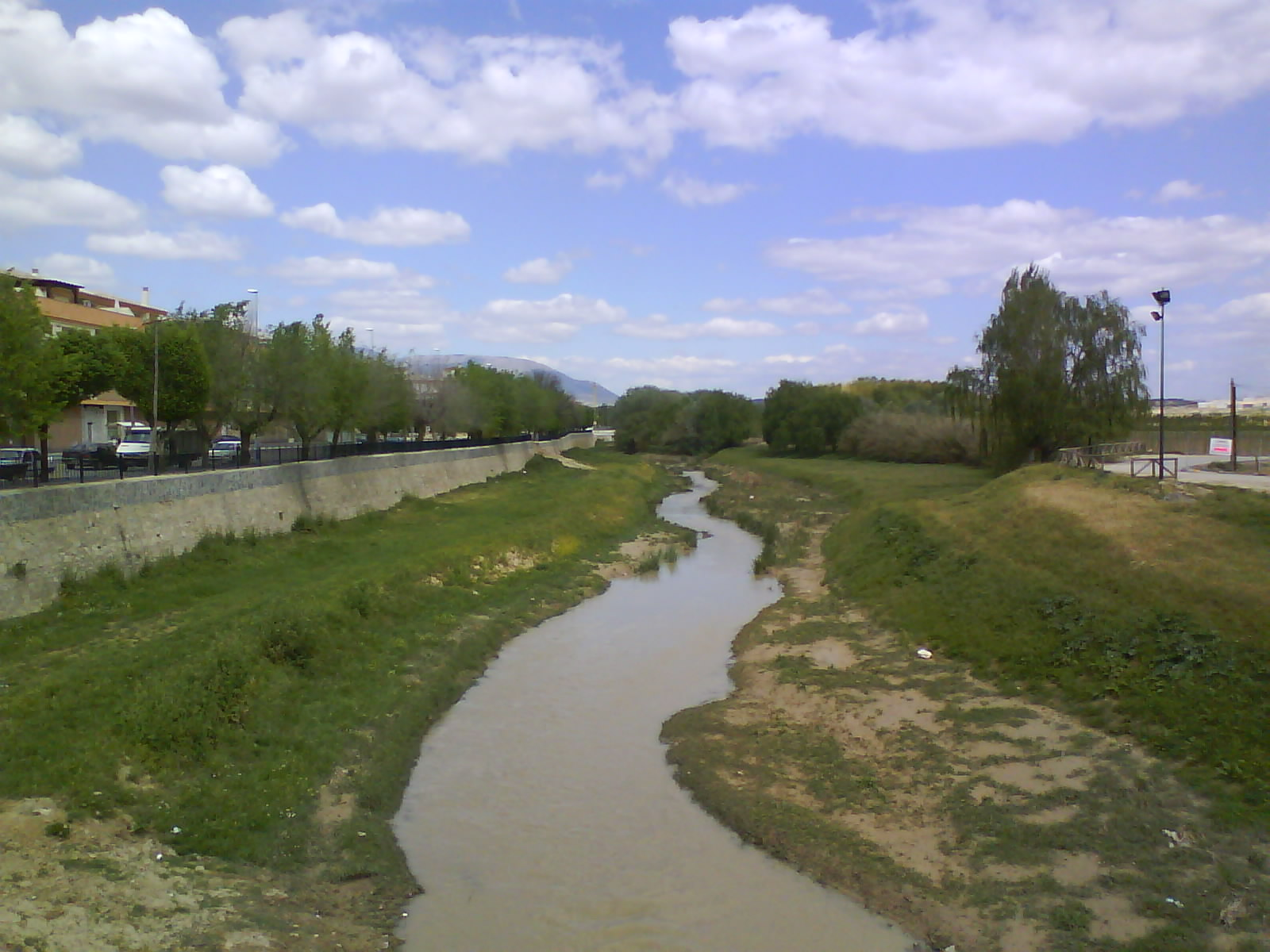 Río Genil a su paso por Huétor Tájar, en Granada (España)